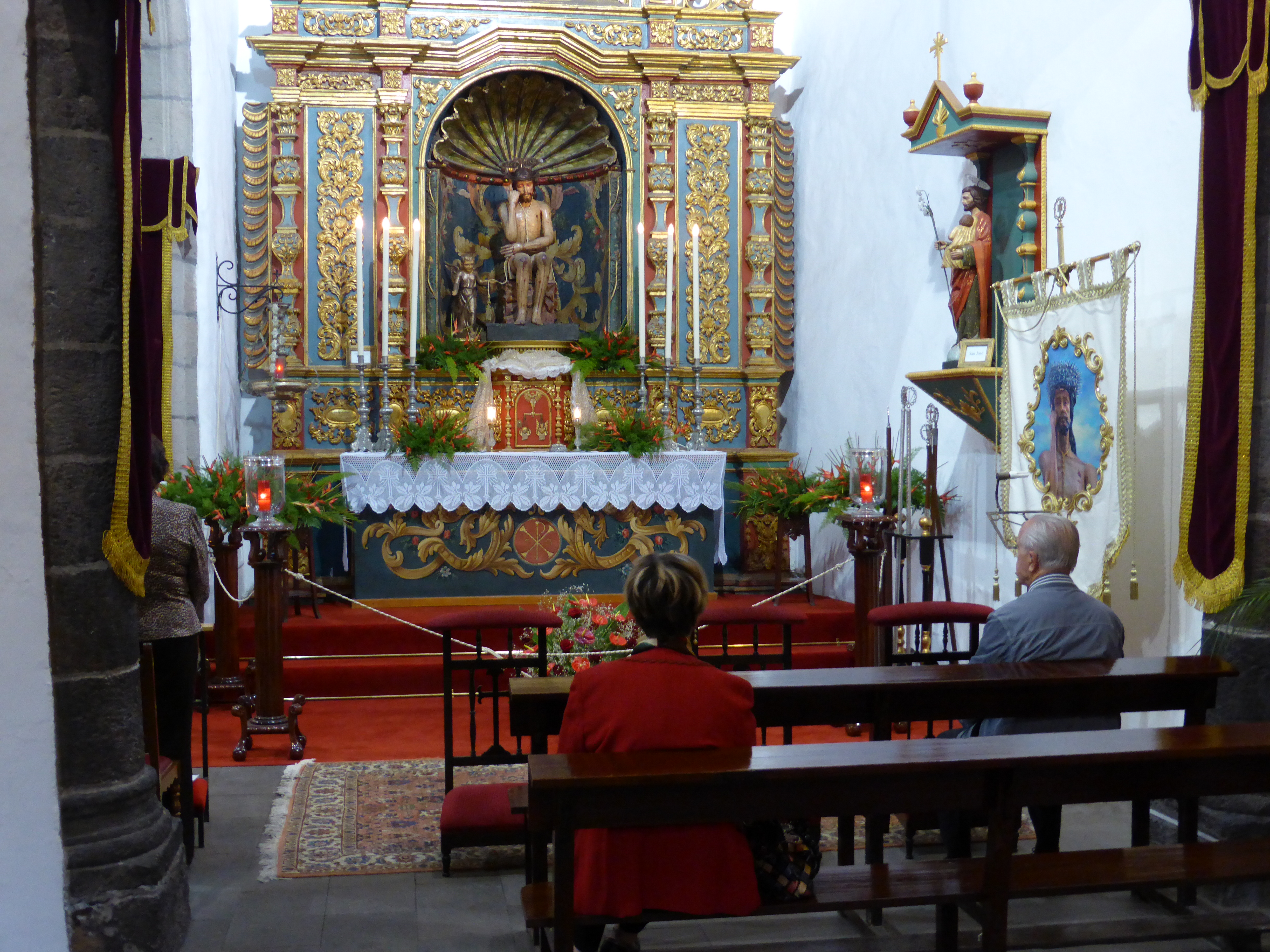 En el siglo XVI se construyó la ermita de San Juan Bautista, en el Puerto Orotava (hoy Puerto de la Cruz). En el siglo XVIII dicha ermita quedó integrada como una nave lateral de la iglesia de San Francisco.